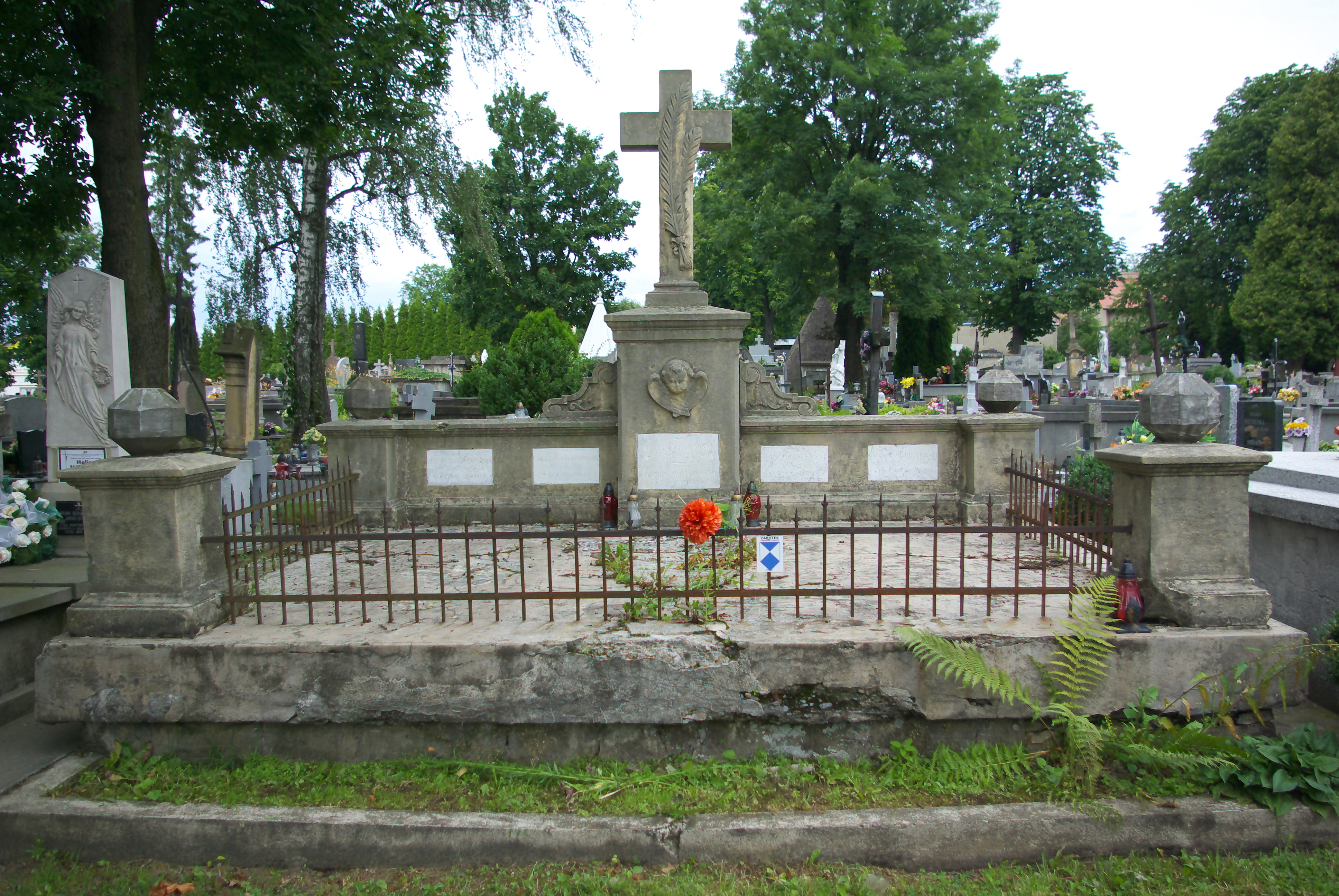 Grobowiec rodziny Mozołowskich na Cmentarzu Centralnym w Sanoku